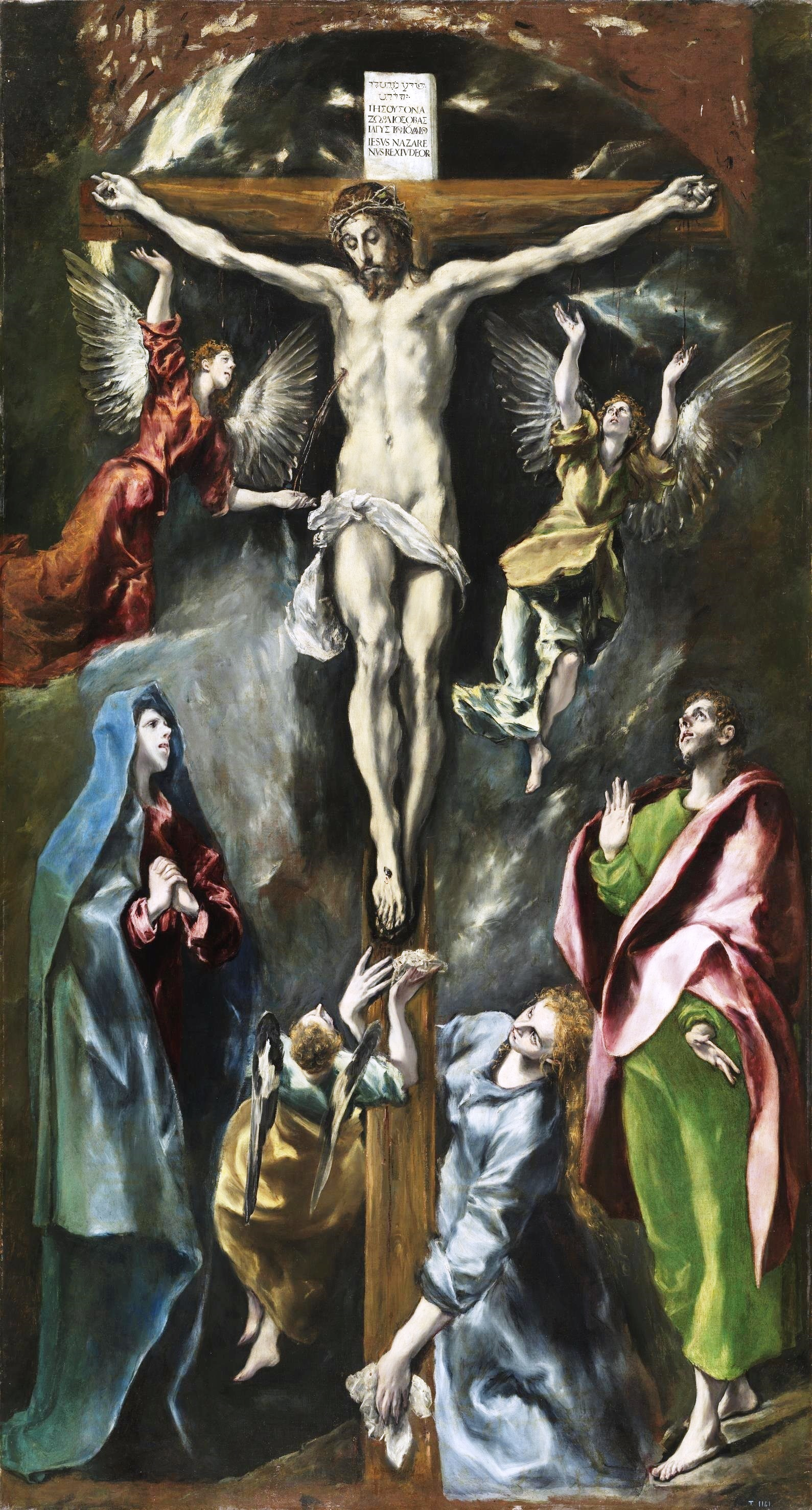 La obra representa a Jesucristo crucificado, hallándose a sus pies su madre, la Virgen María, San Juan Evangelista y María Magdalena, entre otros personajes.